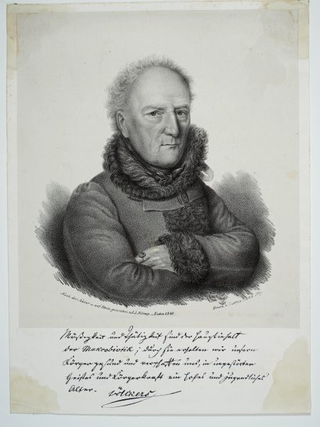 Jacob Jensen Hörup (J J Hørup): Bildnis von Friedrch Carl Völckers (1770-1866), Lithographie, 1846, Schleswig-Holsteinische Landesbibliothek - Landesgeschichtliche Sammlung